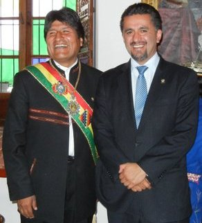 Emb. Sacha Llorenti junto al Presidente de Bolivia Evo Morales Ayma